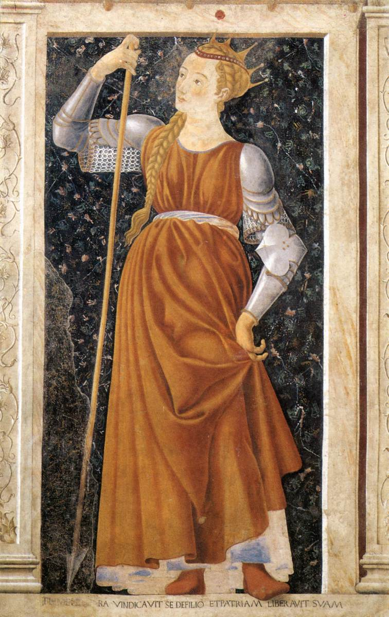 La reine Tomyris par Andrea del Castagno (série des Hommes et femmes illustres)